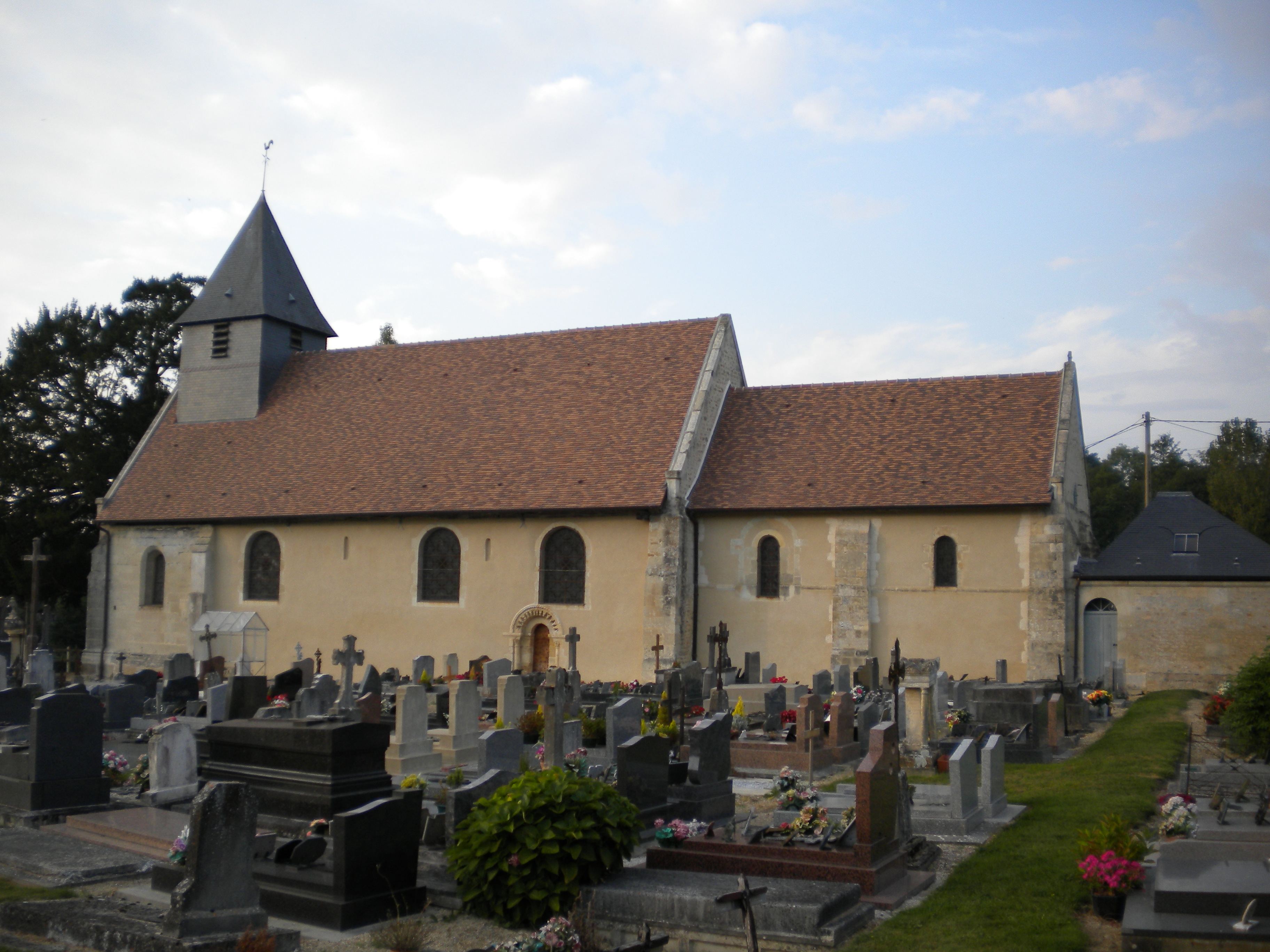 photo de l'église et du cimetiere d'Auvillars (france)